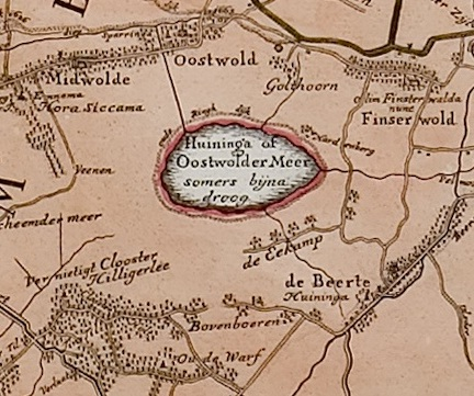 Uitsnede van de kaart van Beckeringh met het Huningameer en omstreken